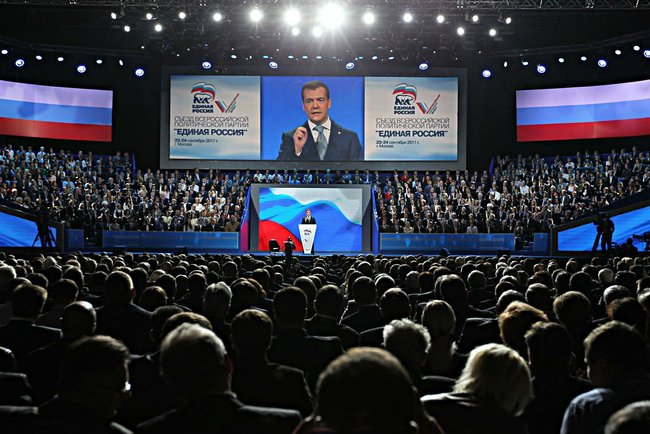 На съезде партии «Единая Россия».